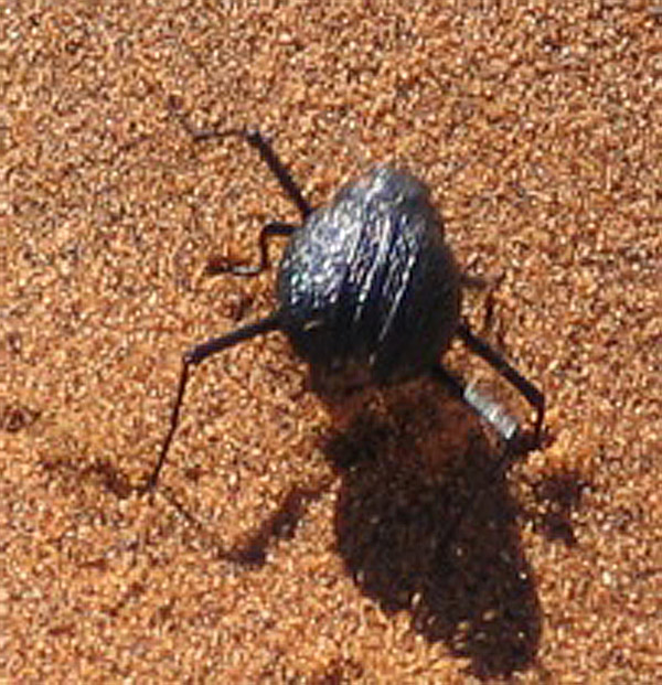 Onymacris unguicularis, Nebeltrinker-Käfer, Sossusvlei, Namibia